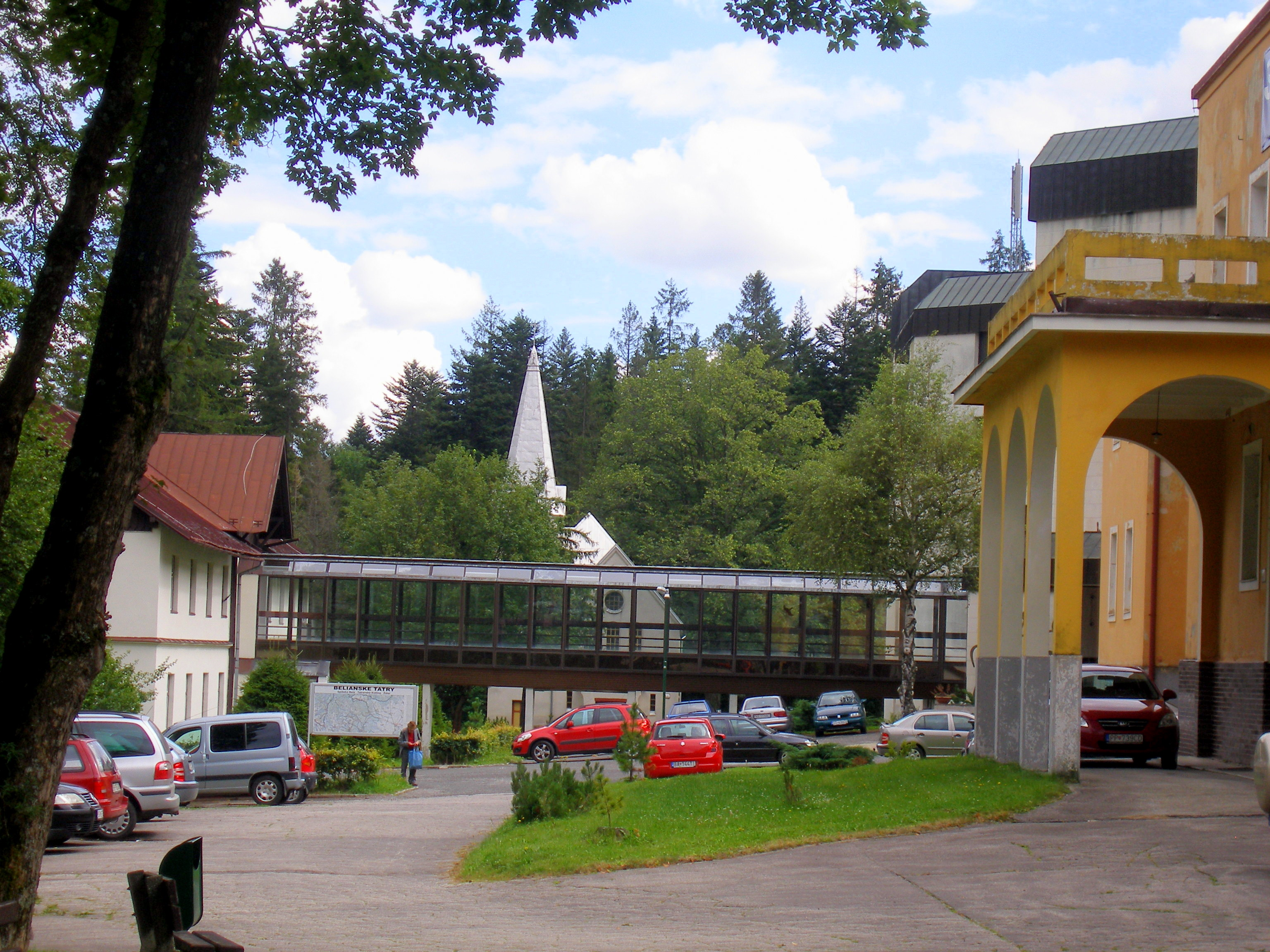 Najvýchodnejšia tatranská osada - Tatranská Kotlina, mesto Vysoké Tatry okres Poprad, región Spiš.